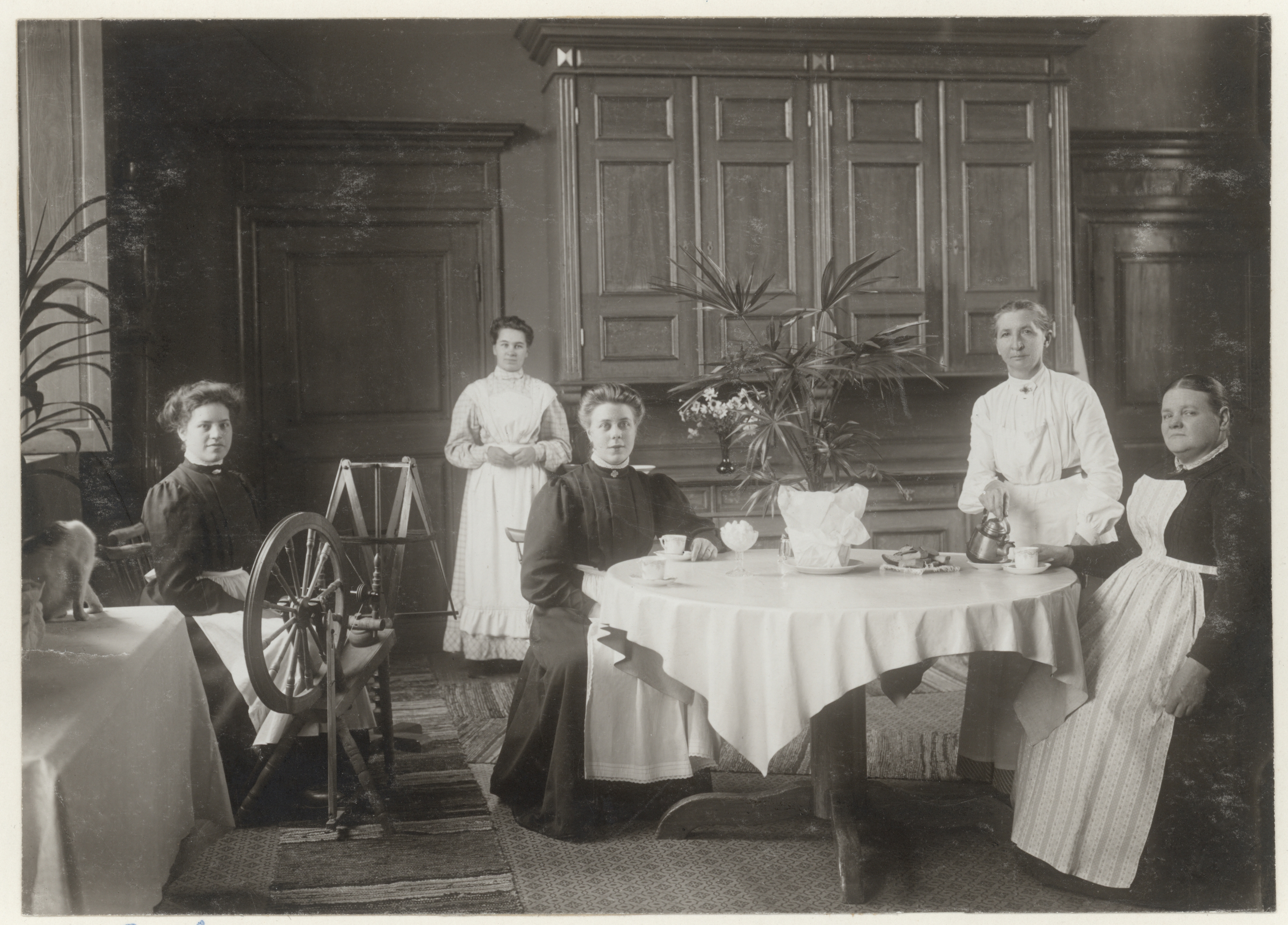 Bjärka - Säby. Slottets tjänare samlade i köket. Östergötland. Hanekinds hd. Vists sn.